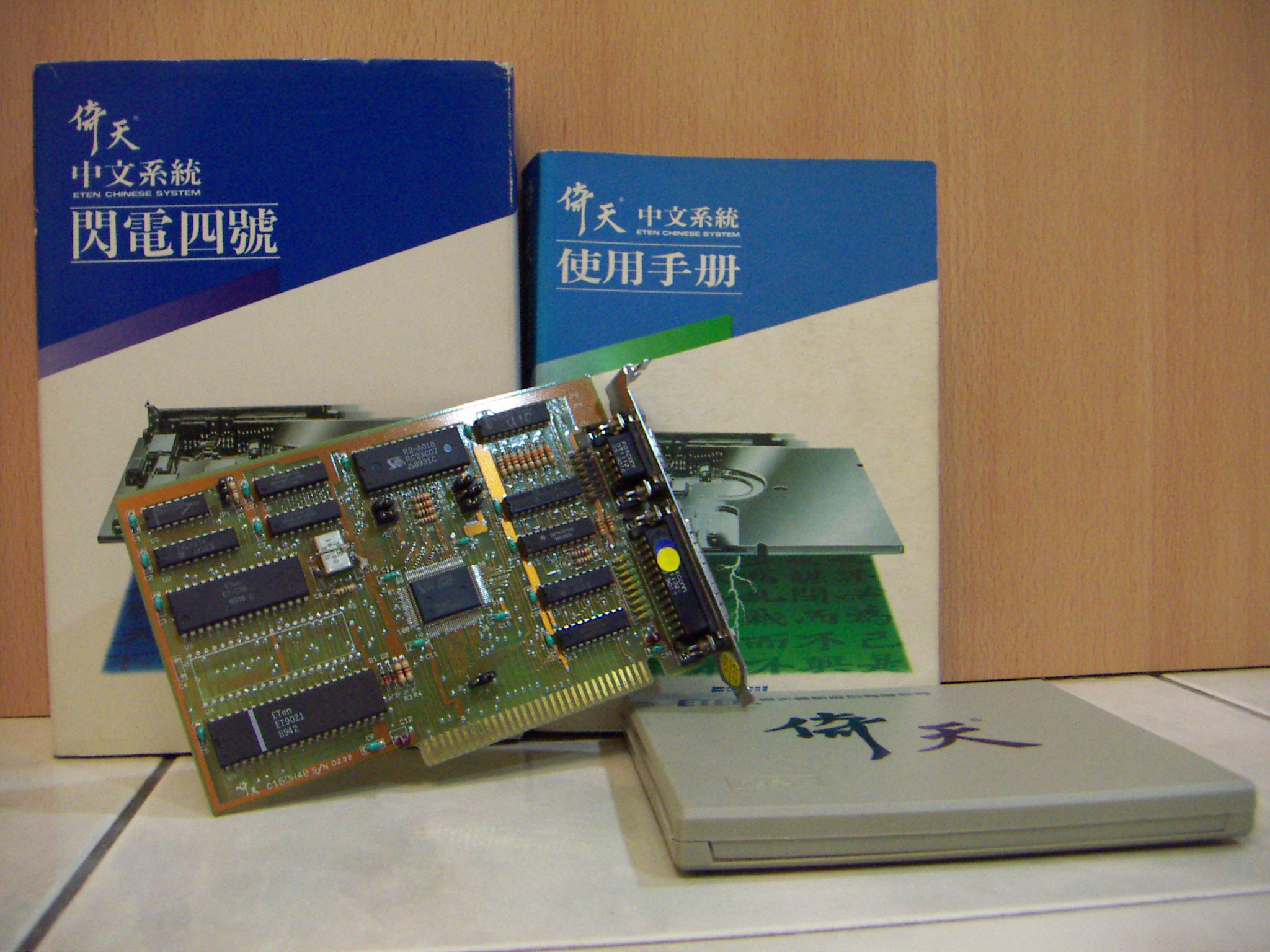 倚天中文系統 閃電四號卡，為 ISA 介面卡。 ROM 內建 13502 個 16x15 明體中文字型、倉頡/注音/行列輸入法參考檔。並有 MGA/CGA 顯示輸出介面與並列式印表機連接埠。 圖片左上為產品包裝盒，右上為使用手冊，左下為閃電四號卡，右下為磁片包裝盒。